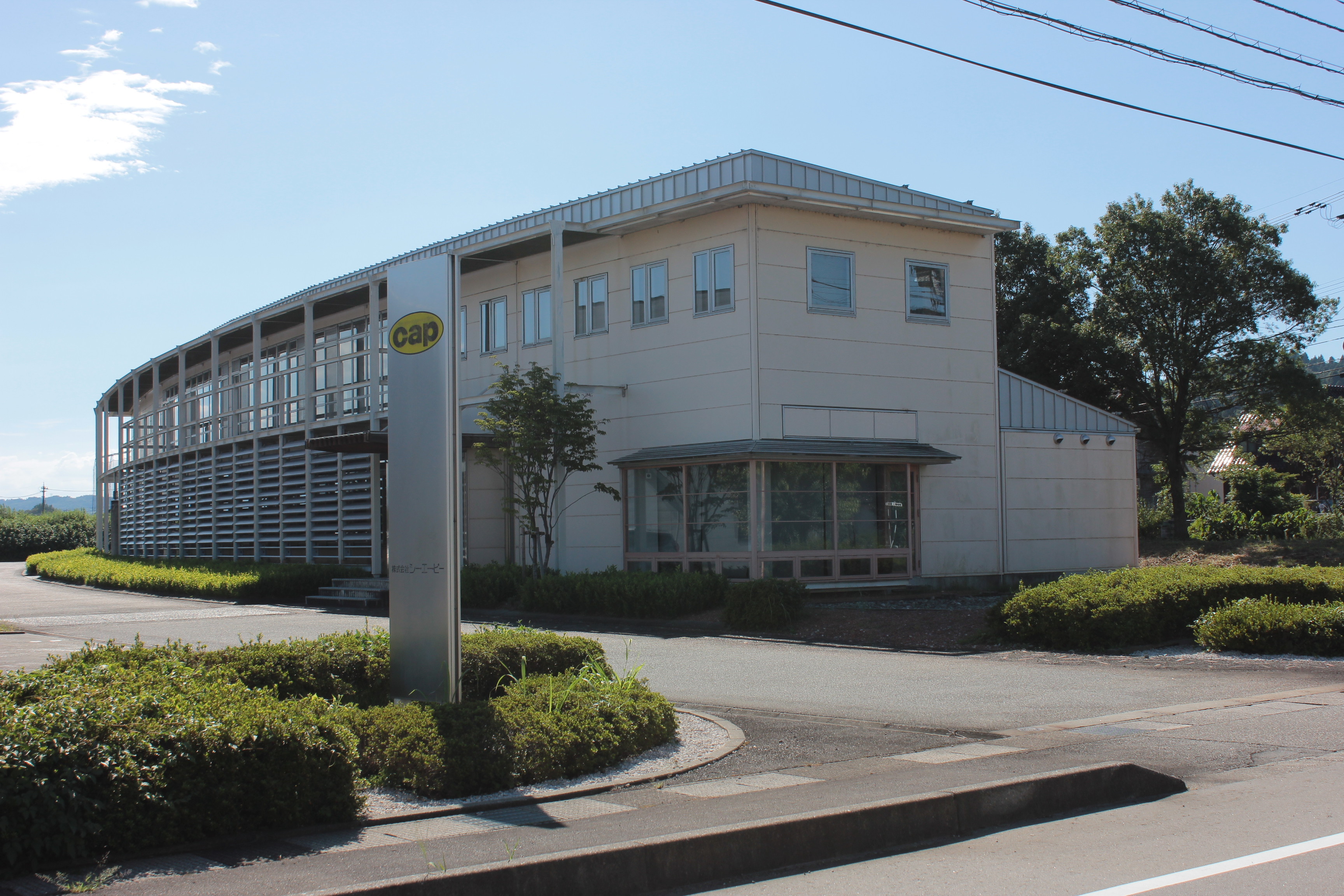 シー・エー・ピー本社（富山県富山市） Canon EOS Kiss X5